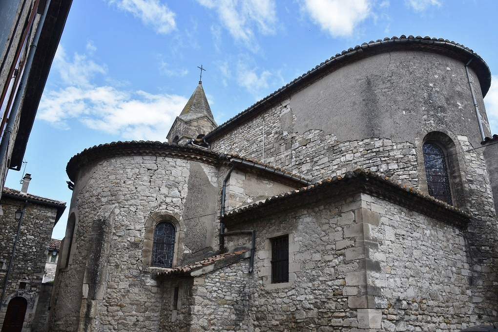 église Saint Jean